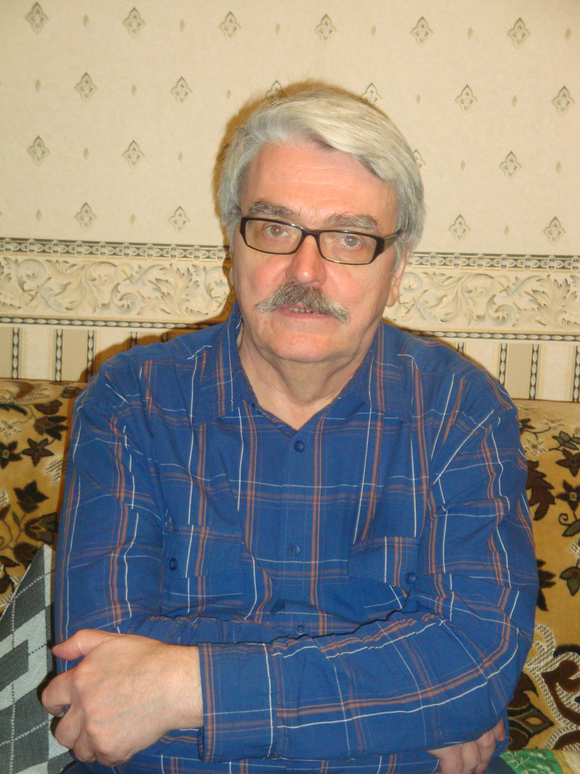 На фото изображен Дронов Александр Суренович, трехкратный чемпион мира по шахматам по переписке